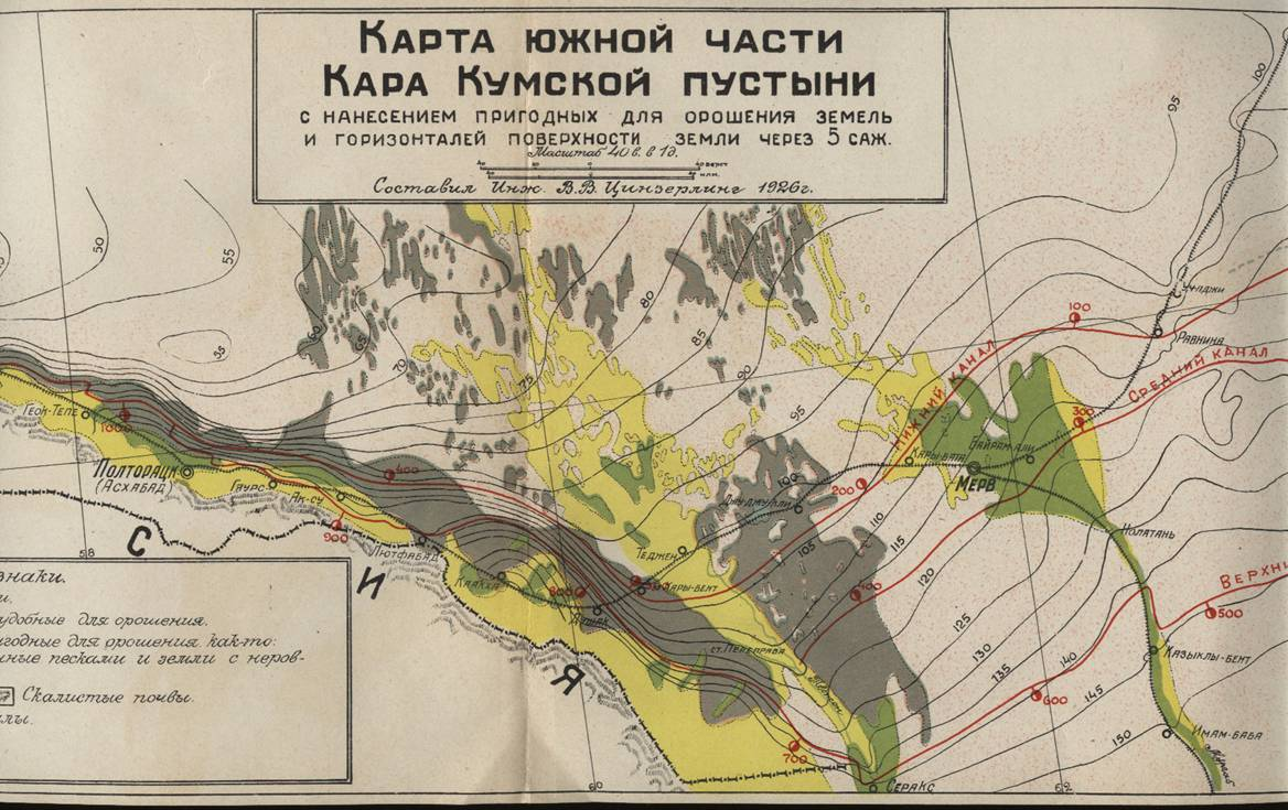 Скан схемы земель, пригодных для орошения на юге Кара Кумской пустыни, 1926 год